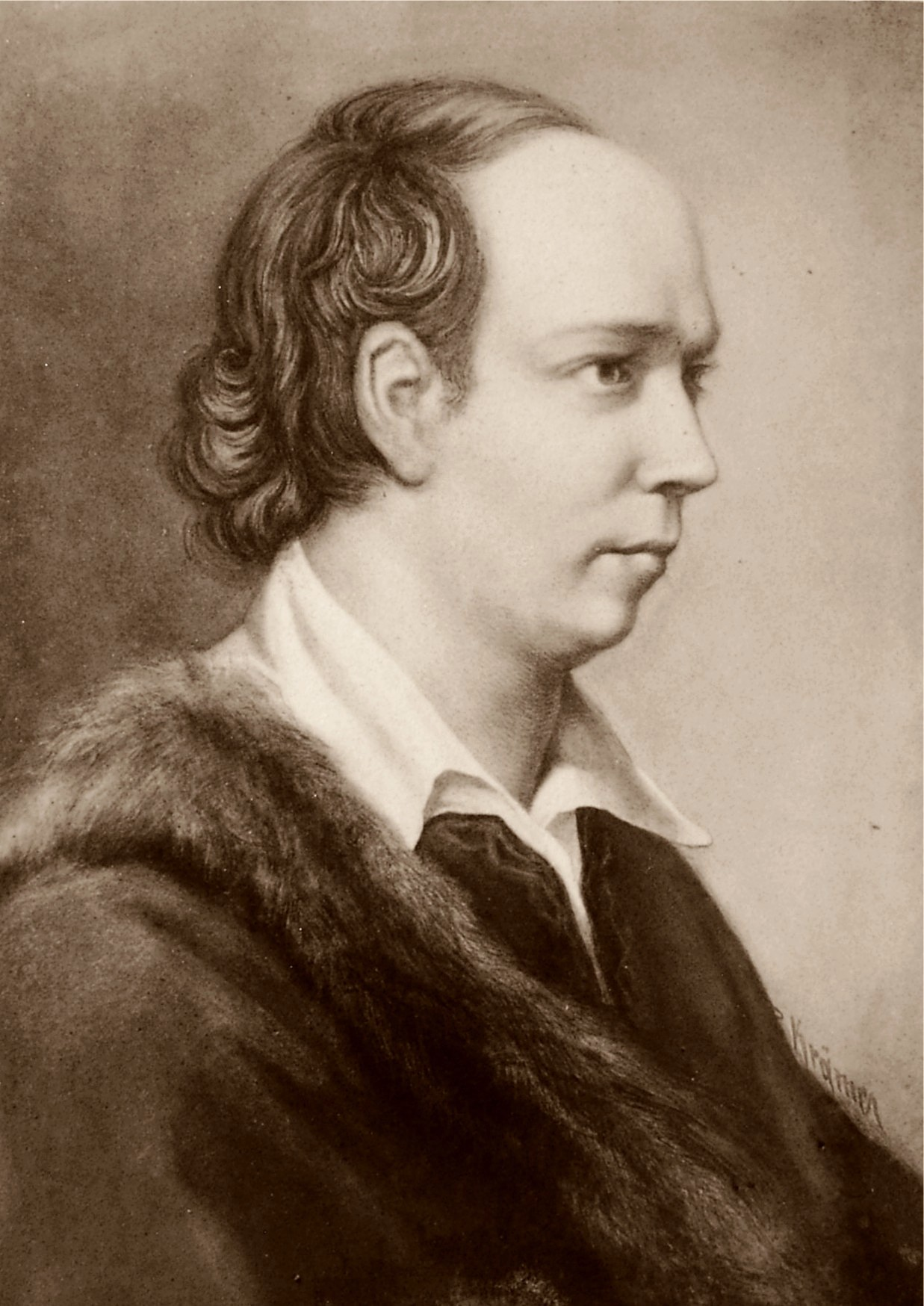 Oliver Goldsmith 1728-1774 anglo-irischer Schriftsteller und Poet.